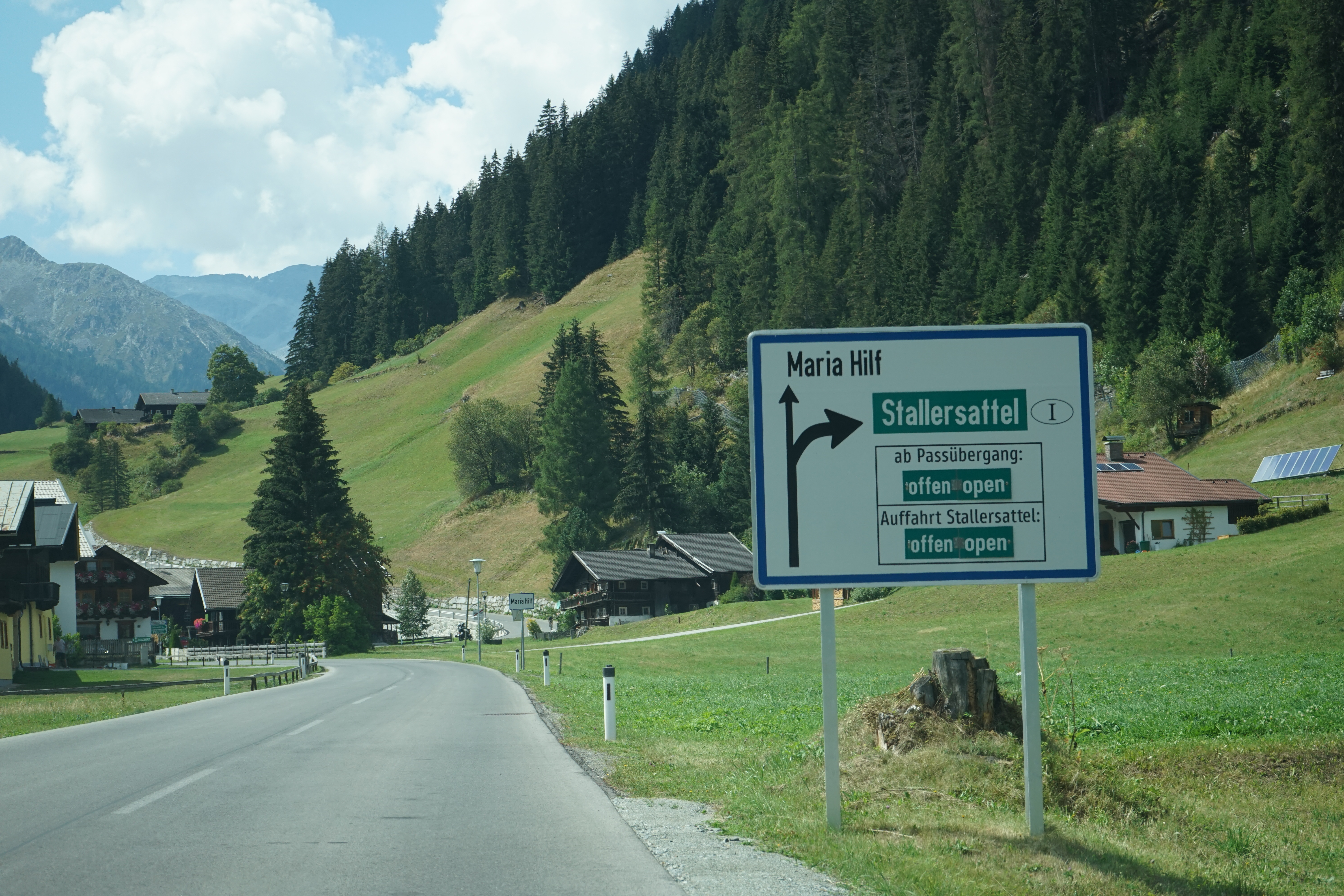 Hinweisschilder zu Maria Hilf, Stallersattel.